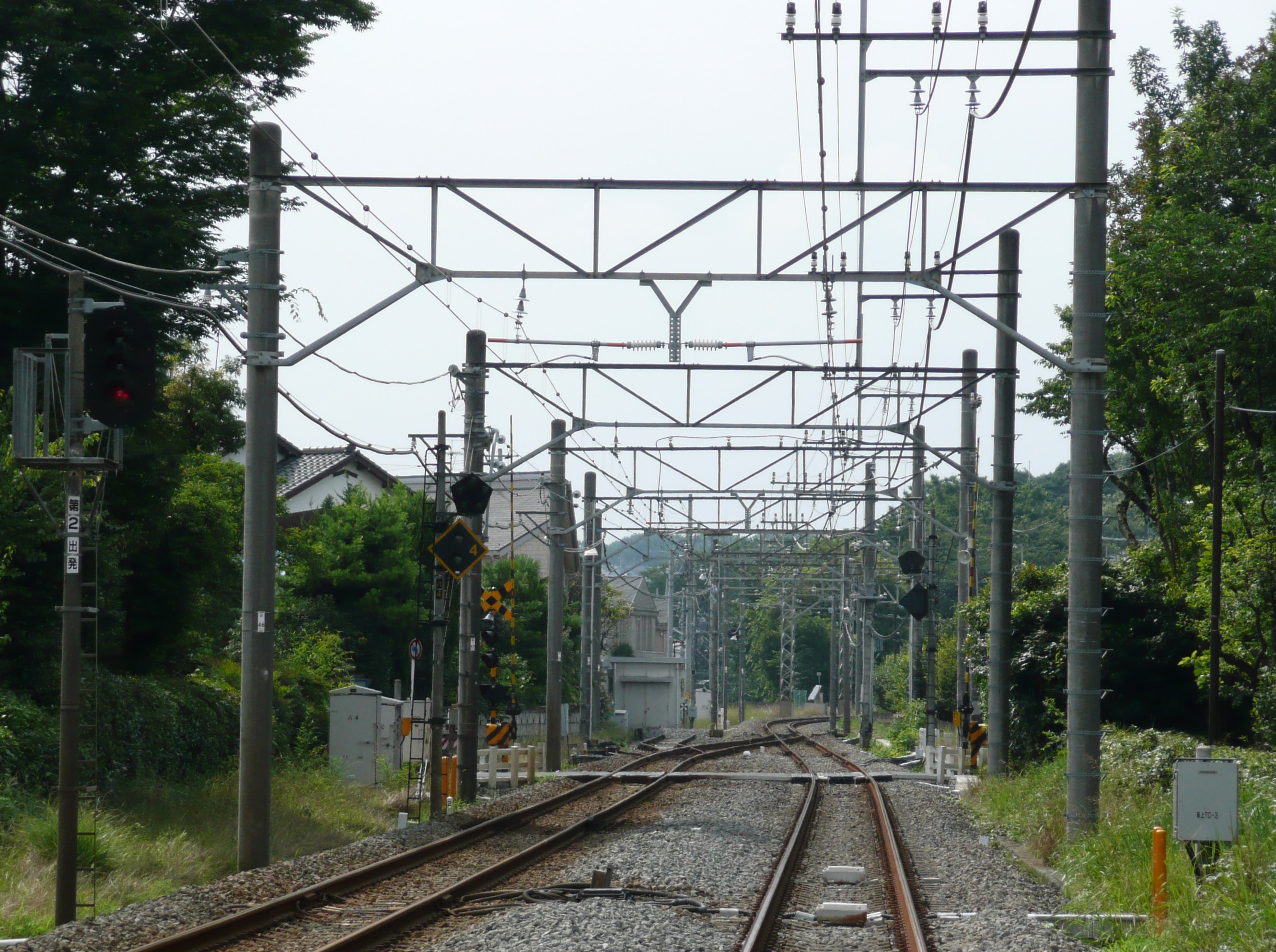 回田信号所（武蔵大和駅寄りの分岐器）